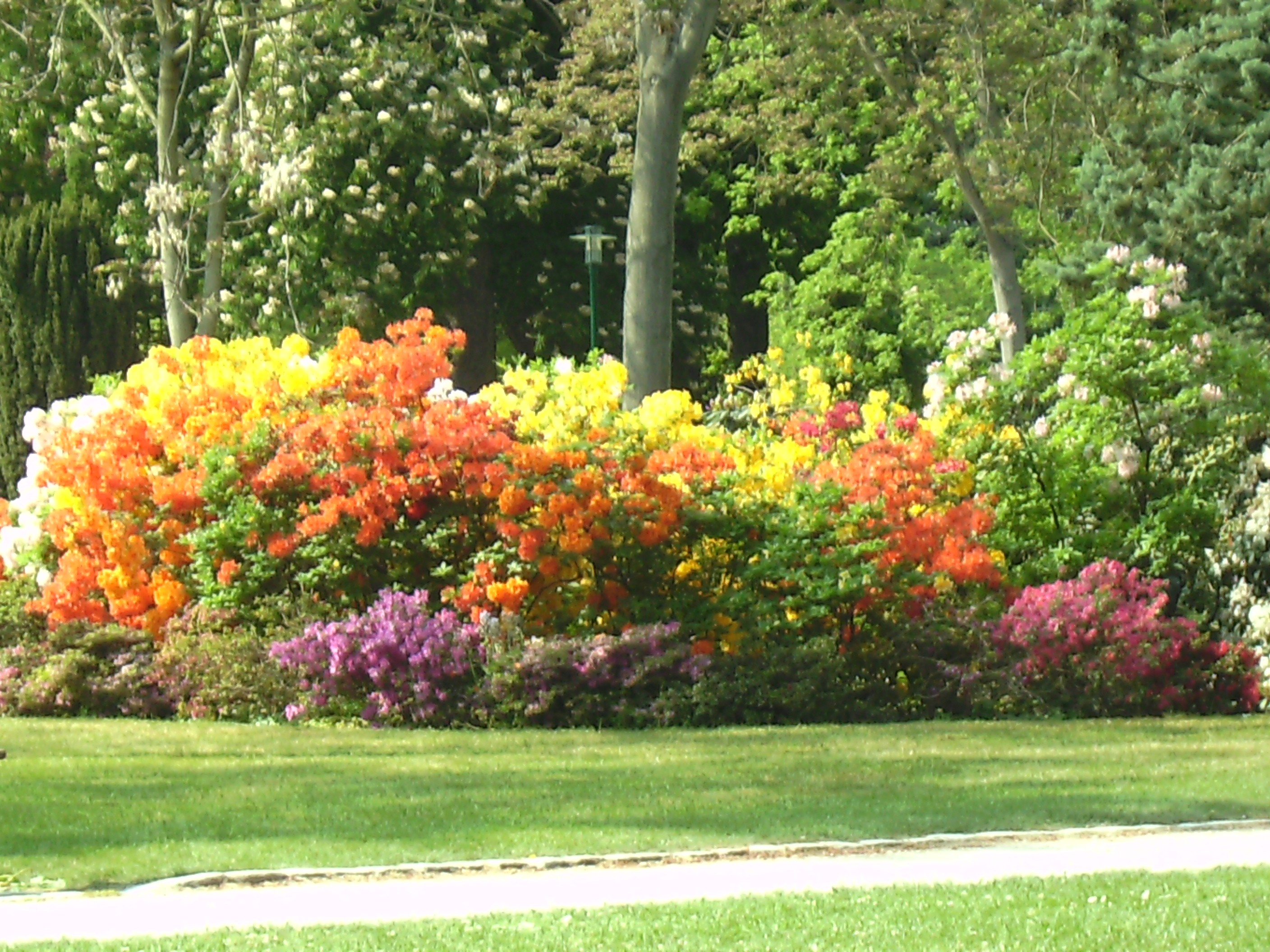 Rhododendron-Gruppe in der "Pépinière" (Nancy)